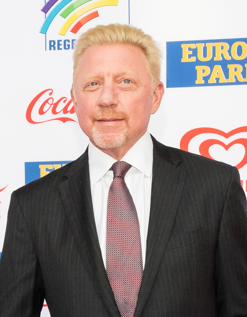 Boris Becker during Radio Regenbogen Award 2019 at Europapark, Rust, Baden-Württemberg, Germany on 2019-04-12, Photo: Sven Mandel